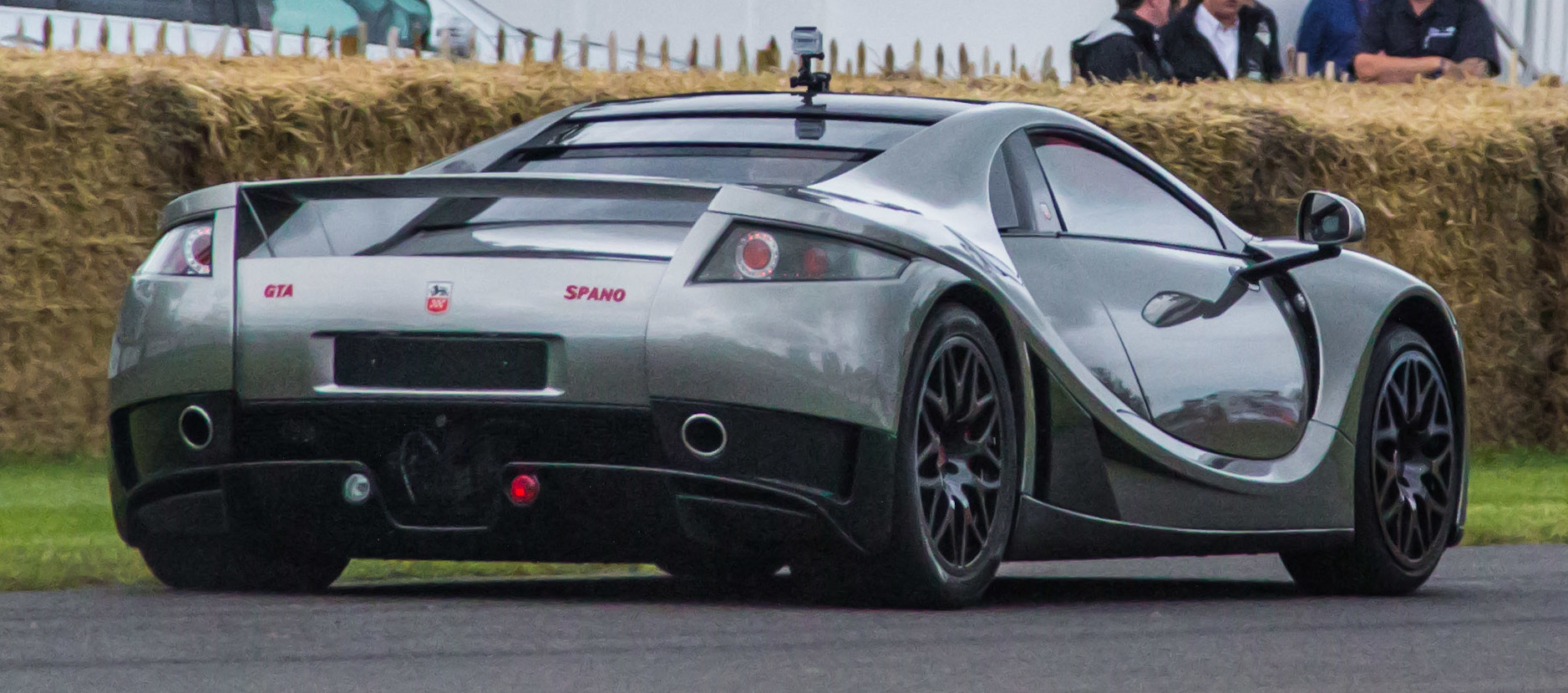 Gta Spano